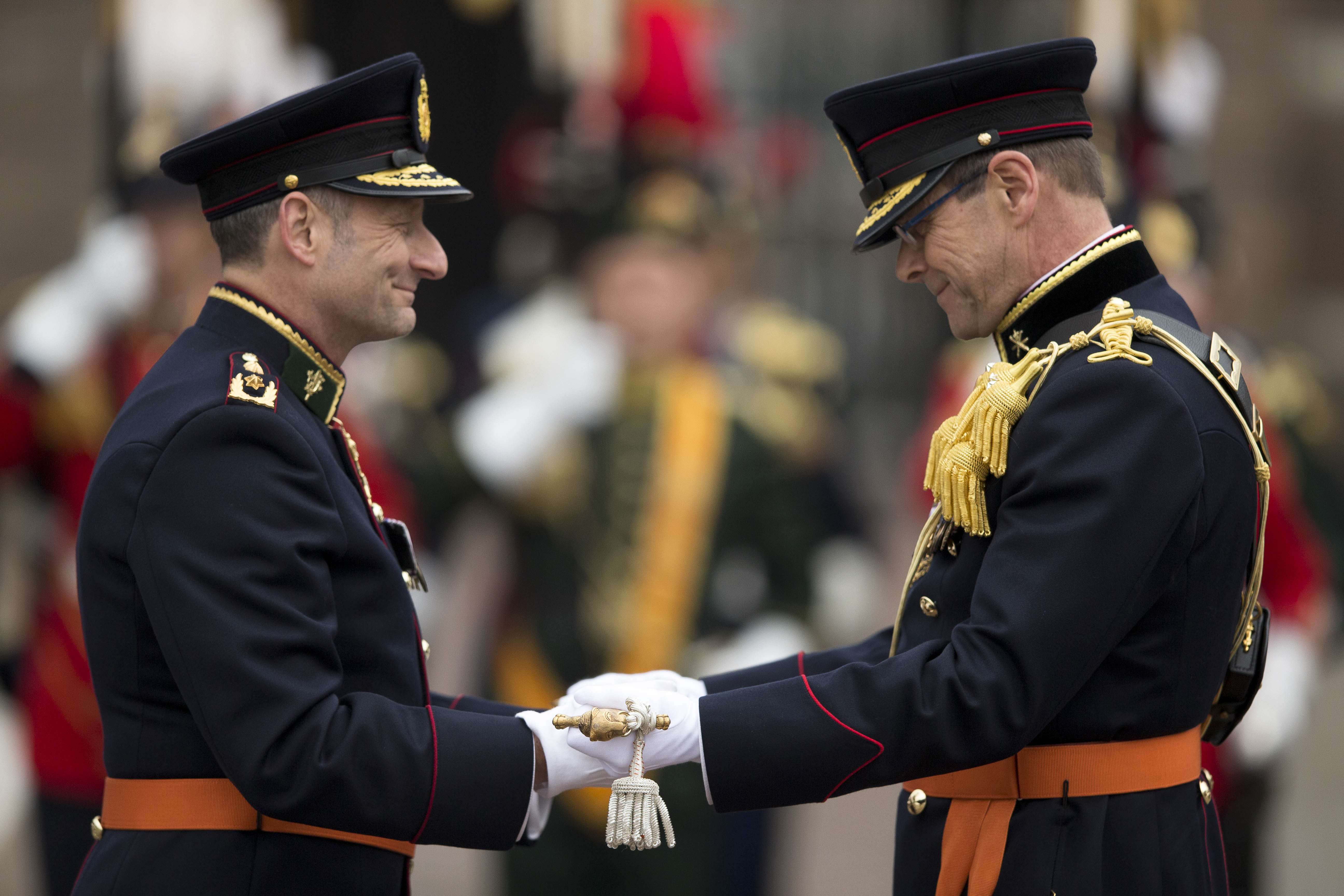 Luitenant-generaal Leo Beulen is sinds 24 maart 2016 de nieuwe commandant van de Koninklijke Landmacht. Op de Nederlandse Defensie Academie in Breda nam hij de functie over van ranggenoot Mart de Kruif.